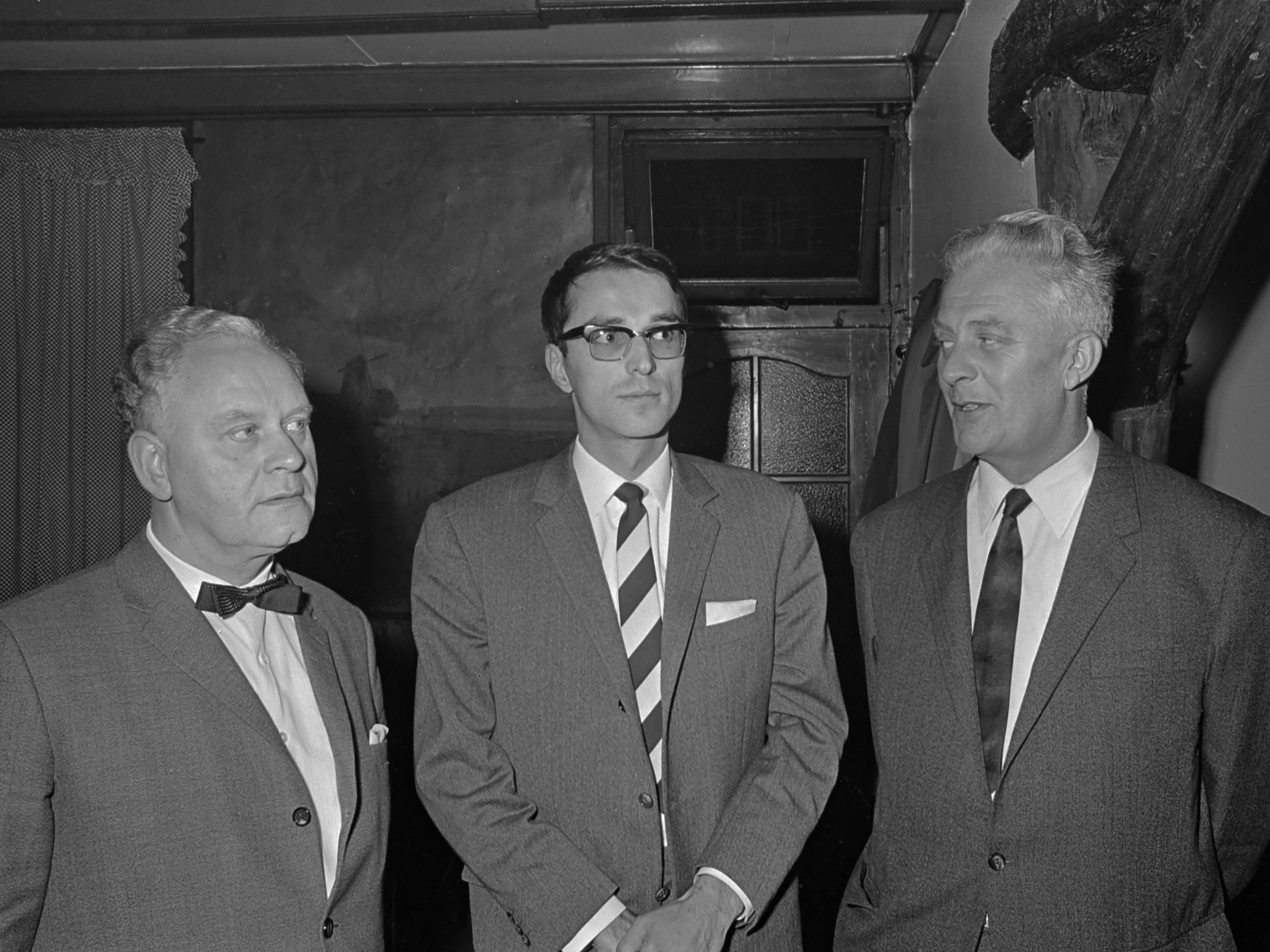 v.l.n.r. de heren Fred Schregardus, Jan Looman en Dhr. Daudey 27 september 1966